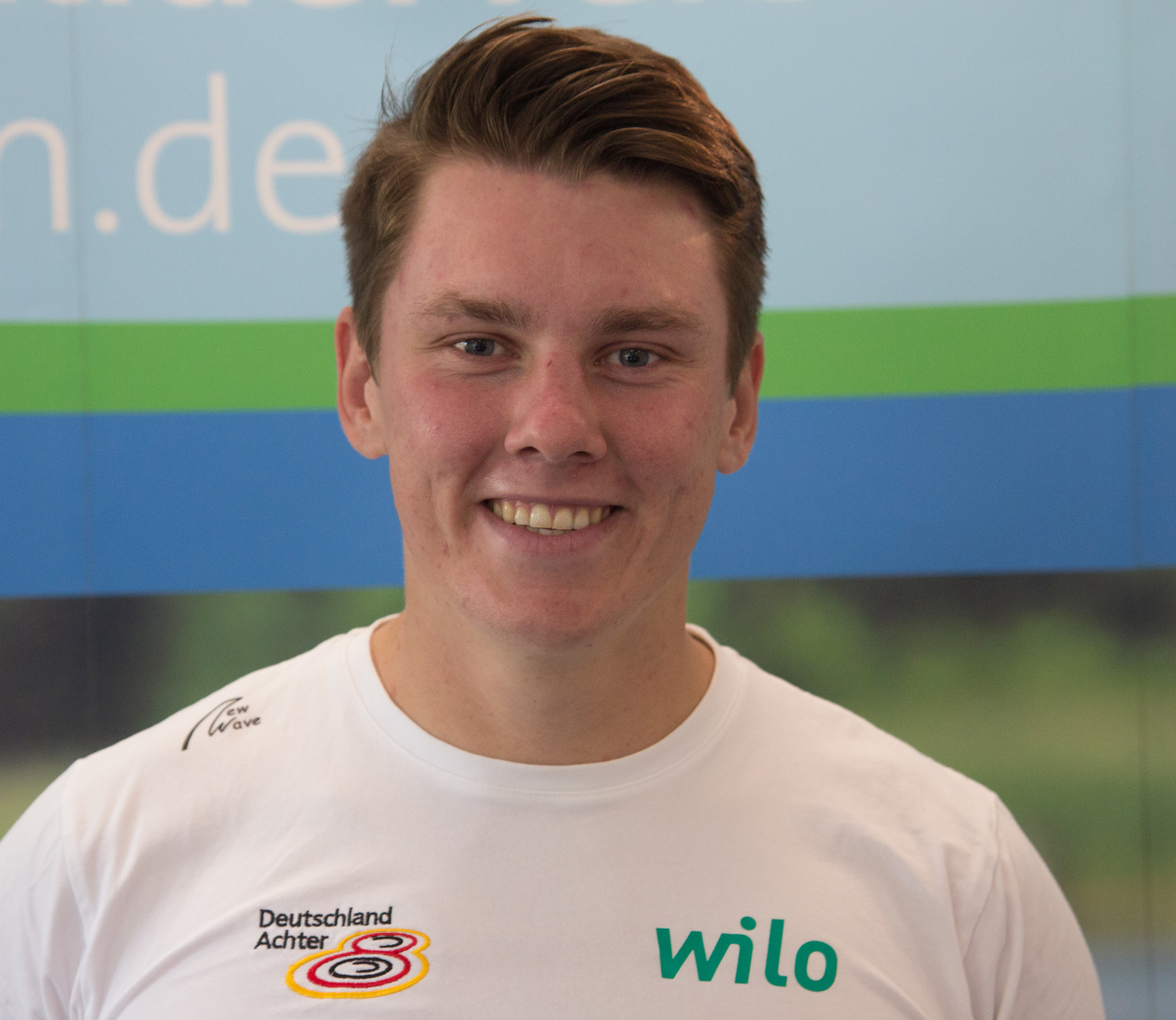 Medientag des Ruderverbandes in der Ruderakademie Ratzeburg am 6. September 2017: Laurits Follert